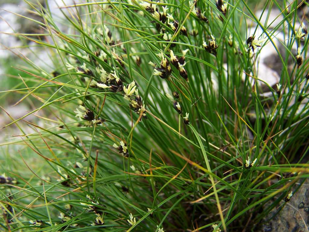 Juncus trifidus (pl. sit skucina), habitat: Tatra Mountains, Ornak